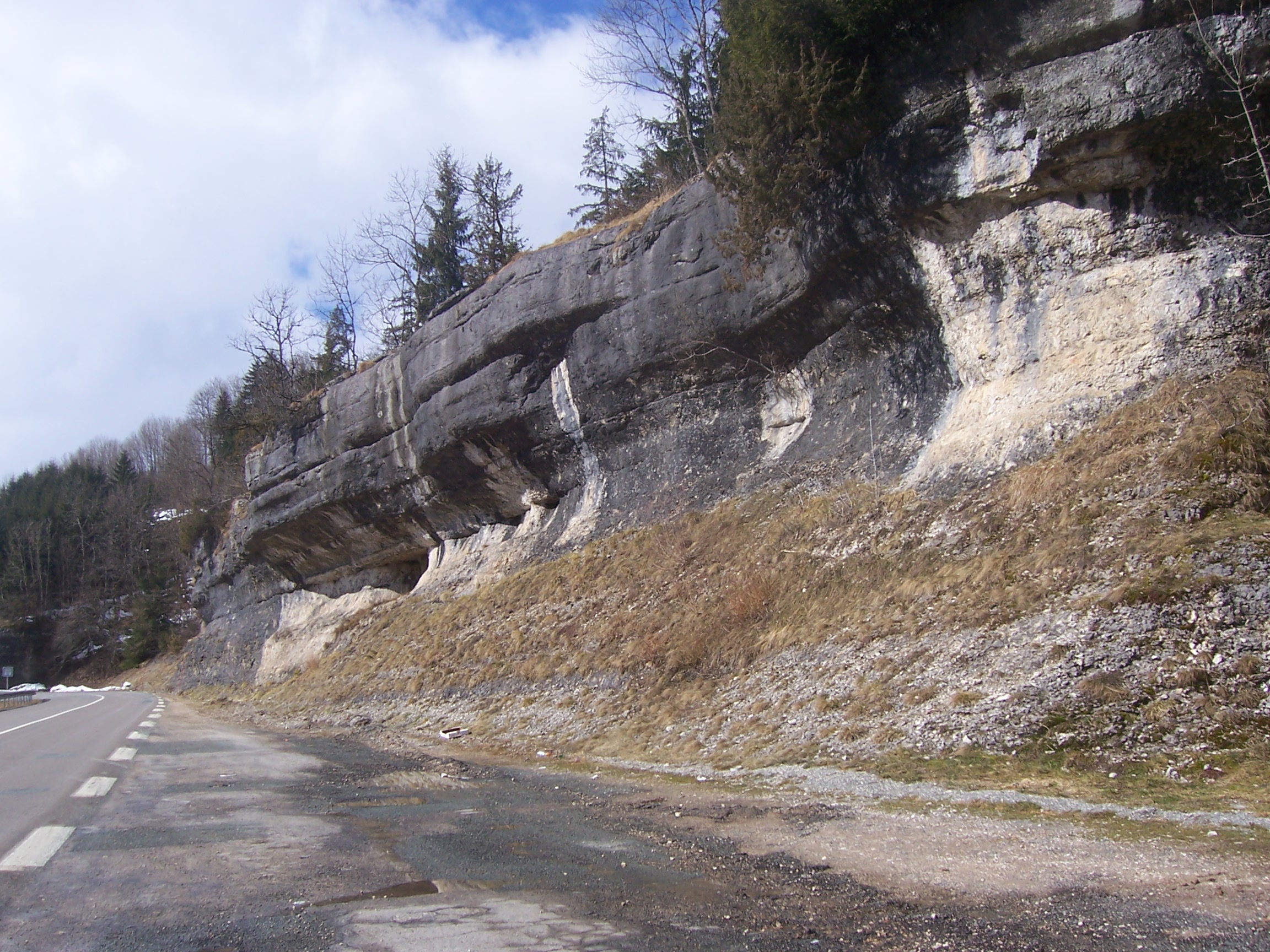 Défilé d'Entre-Roches